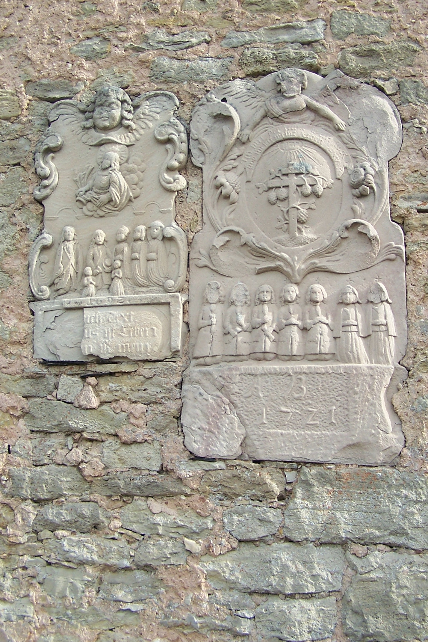 Barocke Grabsteine an der Südfassade der Kirche in Kaltenlengsfeld, Ansicht vom Friedhof.